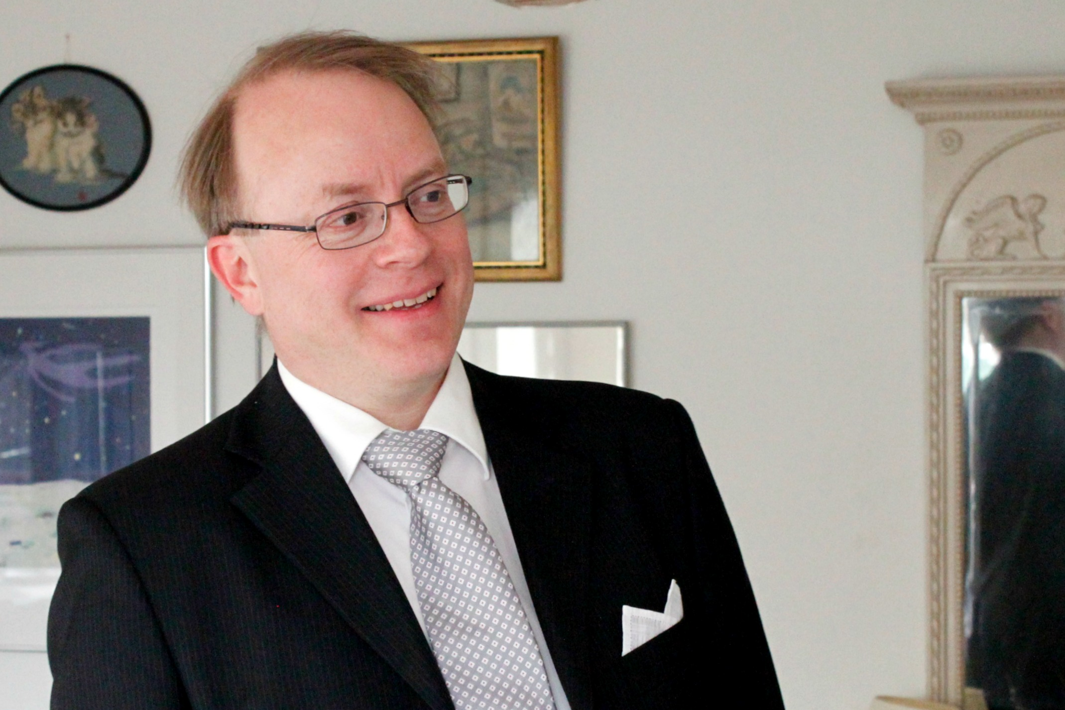 Riho Grünthal vuonna 2014